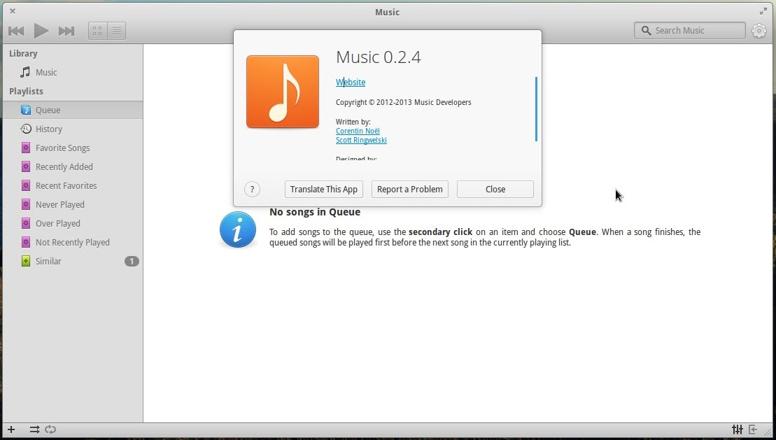 screenshot